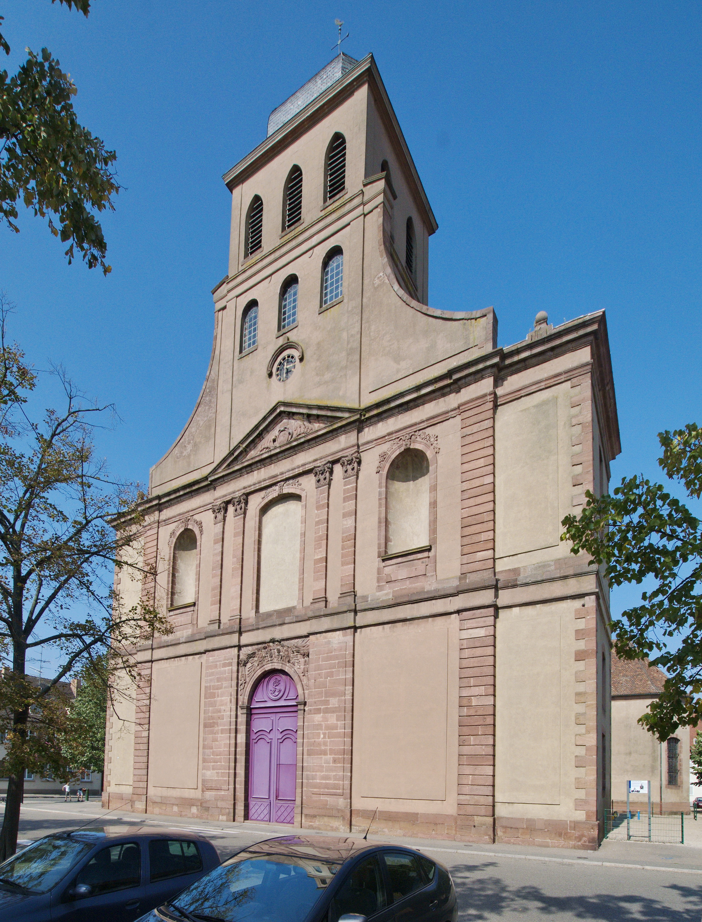 Église Saint-Louis de Neuf-Brisach, 26 place d'Armes (Classé, 1939) .